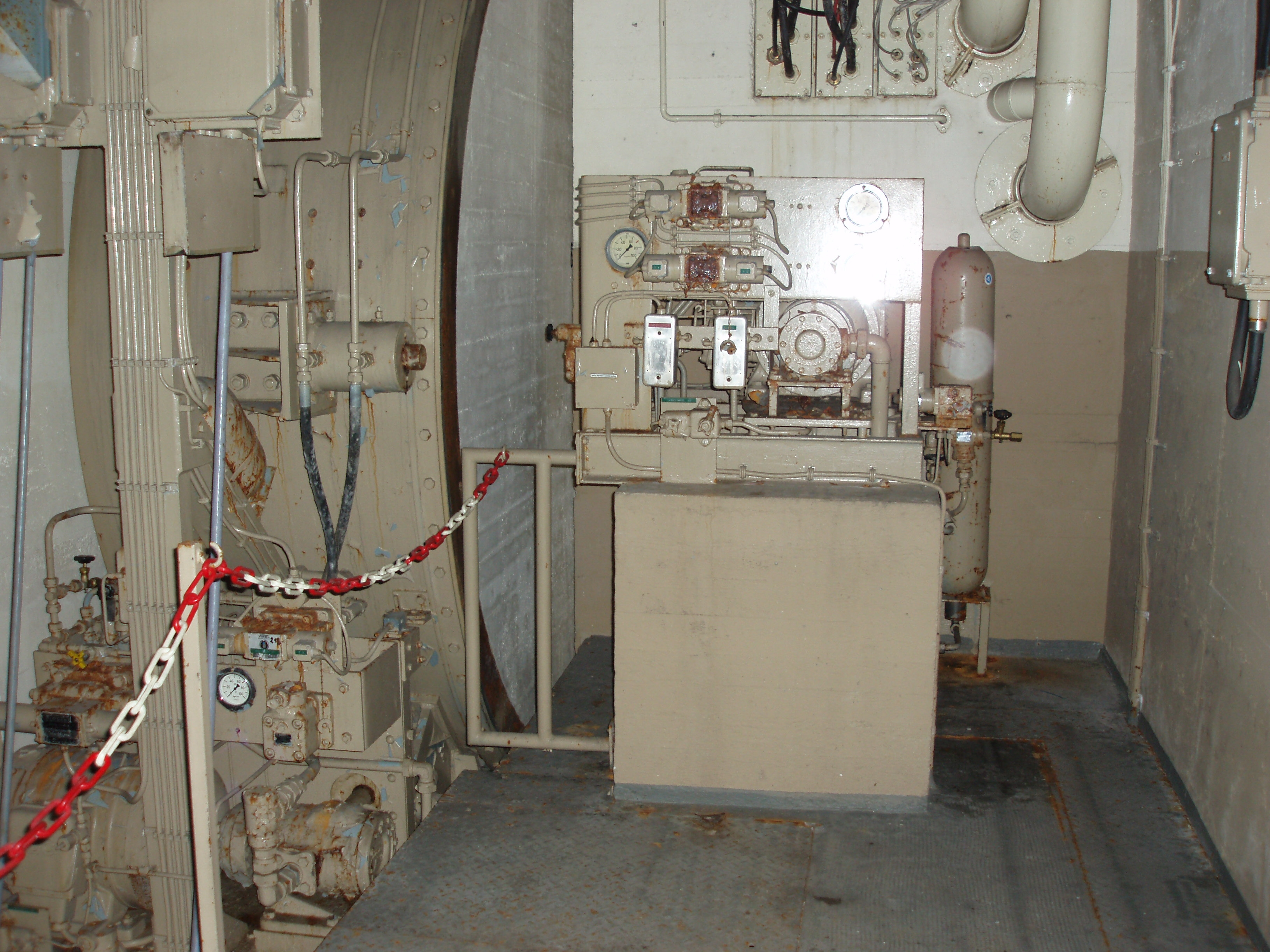 Kontrollraum des Hauptversiegelungstores (links), das den Regierungsbunker in Bad Neuenahr-Ahrweiler innerhalb von Sekunden verschließen konnte.